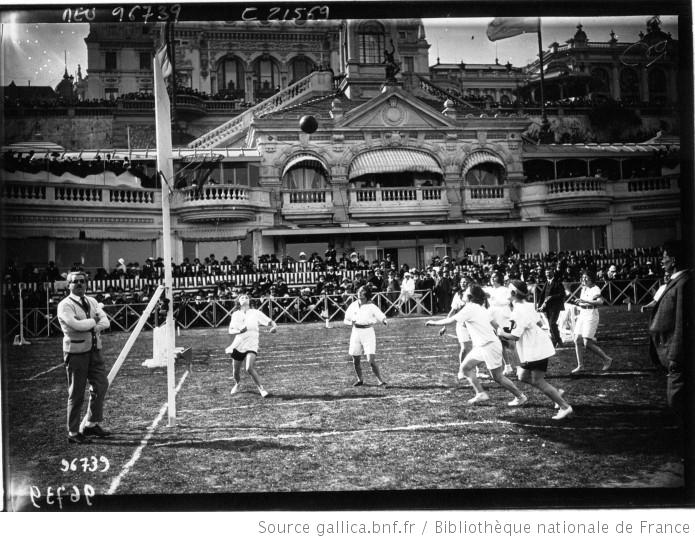 Société de Gymnastique de Caen : démonstration de basket-ball à Monte Carlo en 1922